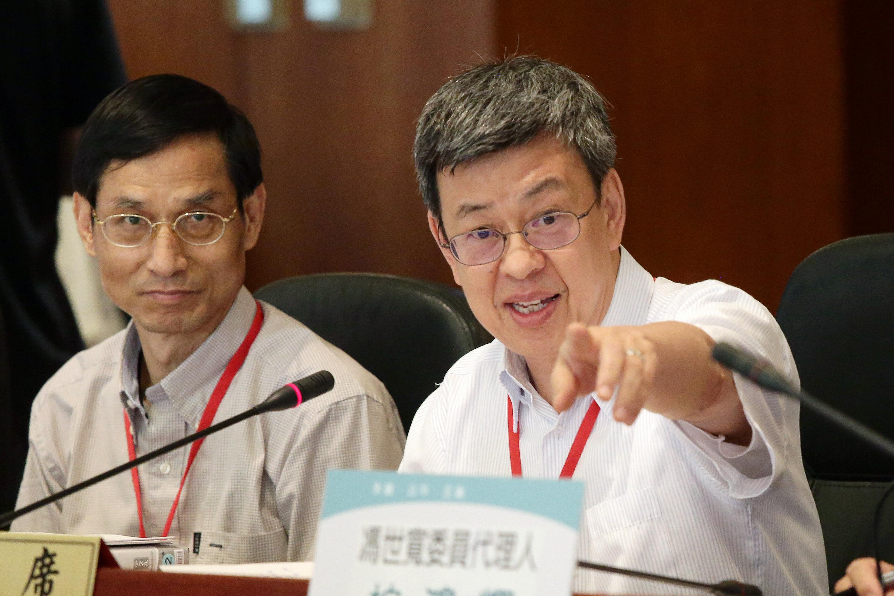 中華民國總統府國家年金改革委員會副召集人林萬億、中華民國副總統陳建仁。